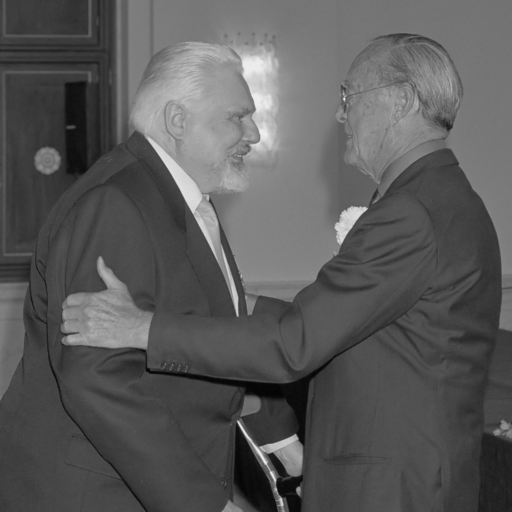 Uitreiking Zilveren Anjers door Prins Bernhard aan violist W. Noske 24 juni 1988